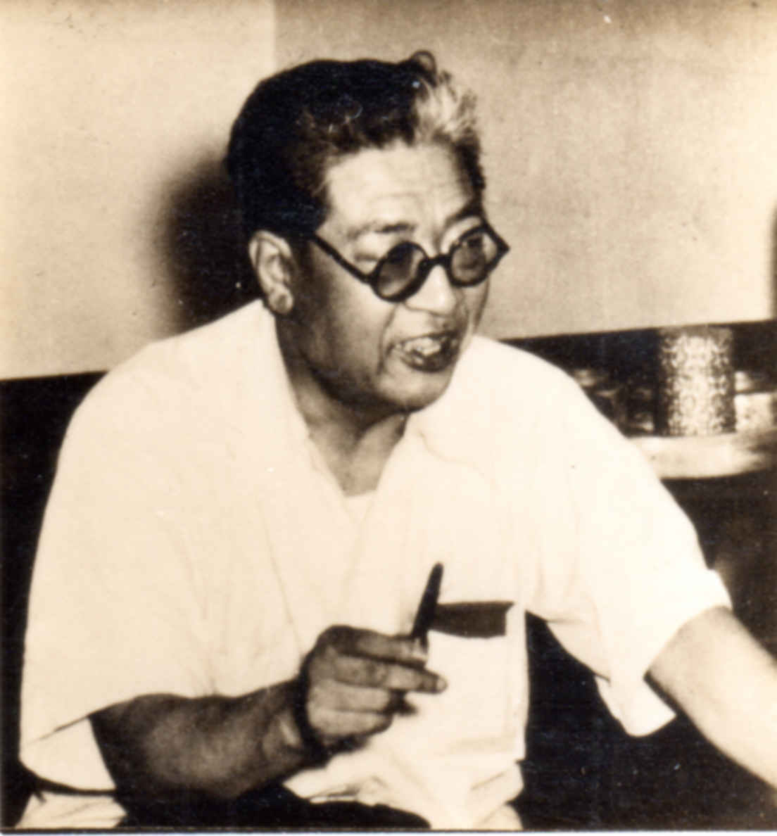 1956年に発行された『胆振日記』（ゑぞ・まめほん No.15）に掲載された、著者・川上澄生の肖像写真。